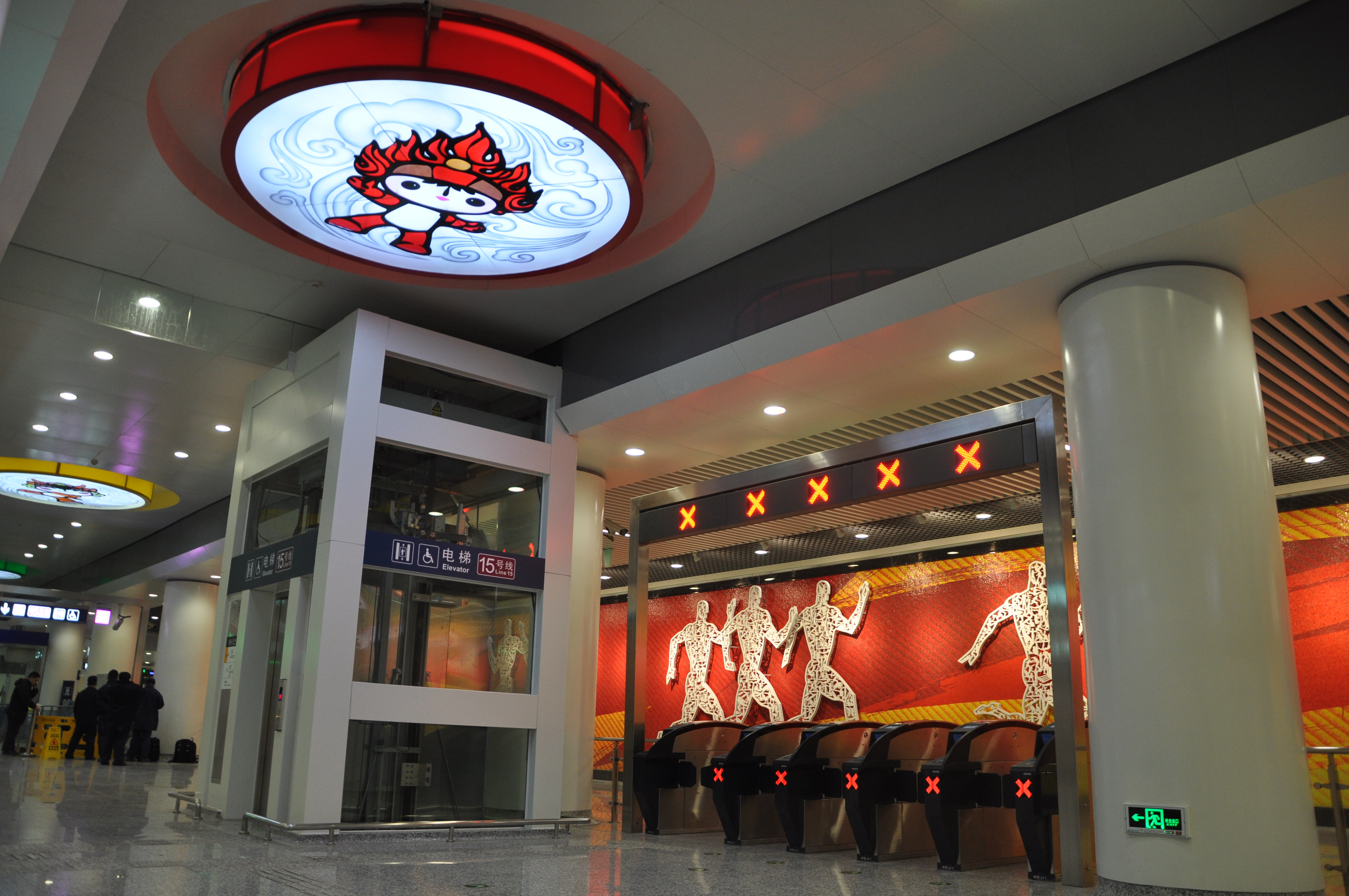 北京地铁15号线奥林匹克公园站站厅